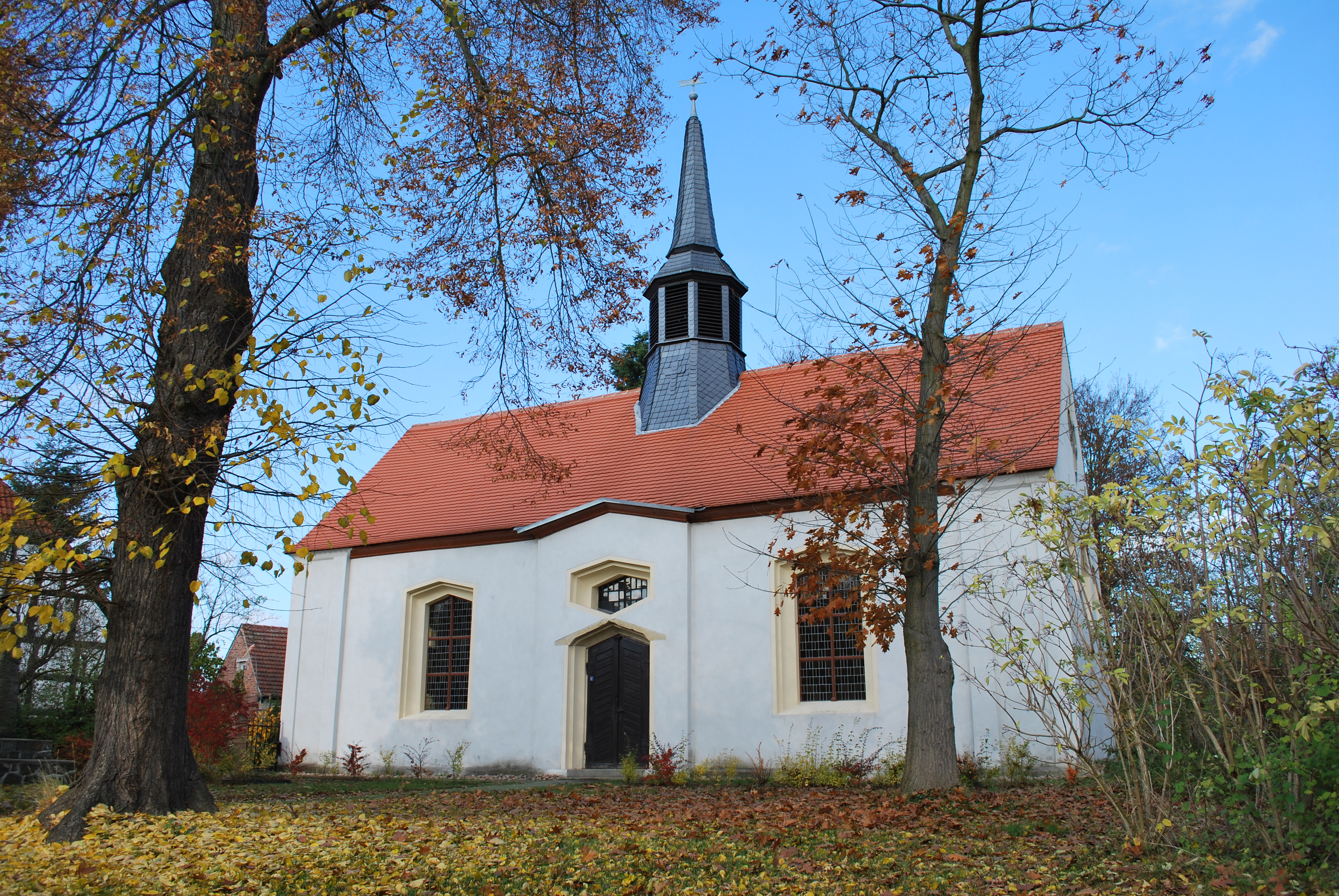 Dorfkirche in Cobbel